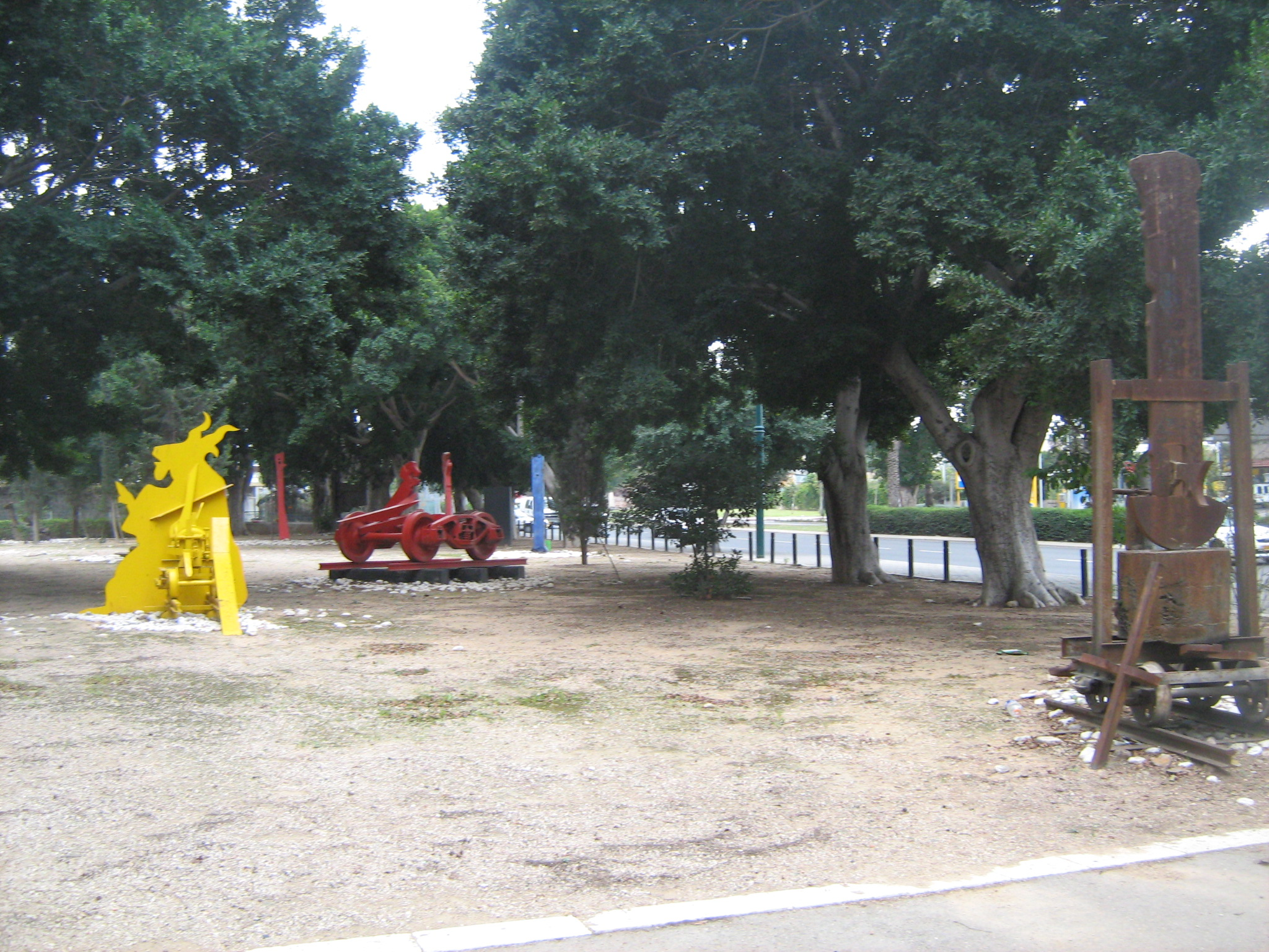 סביל אבו נבוט בדרך בן צבי